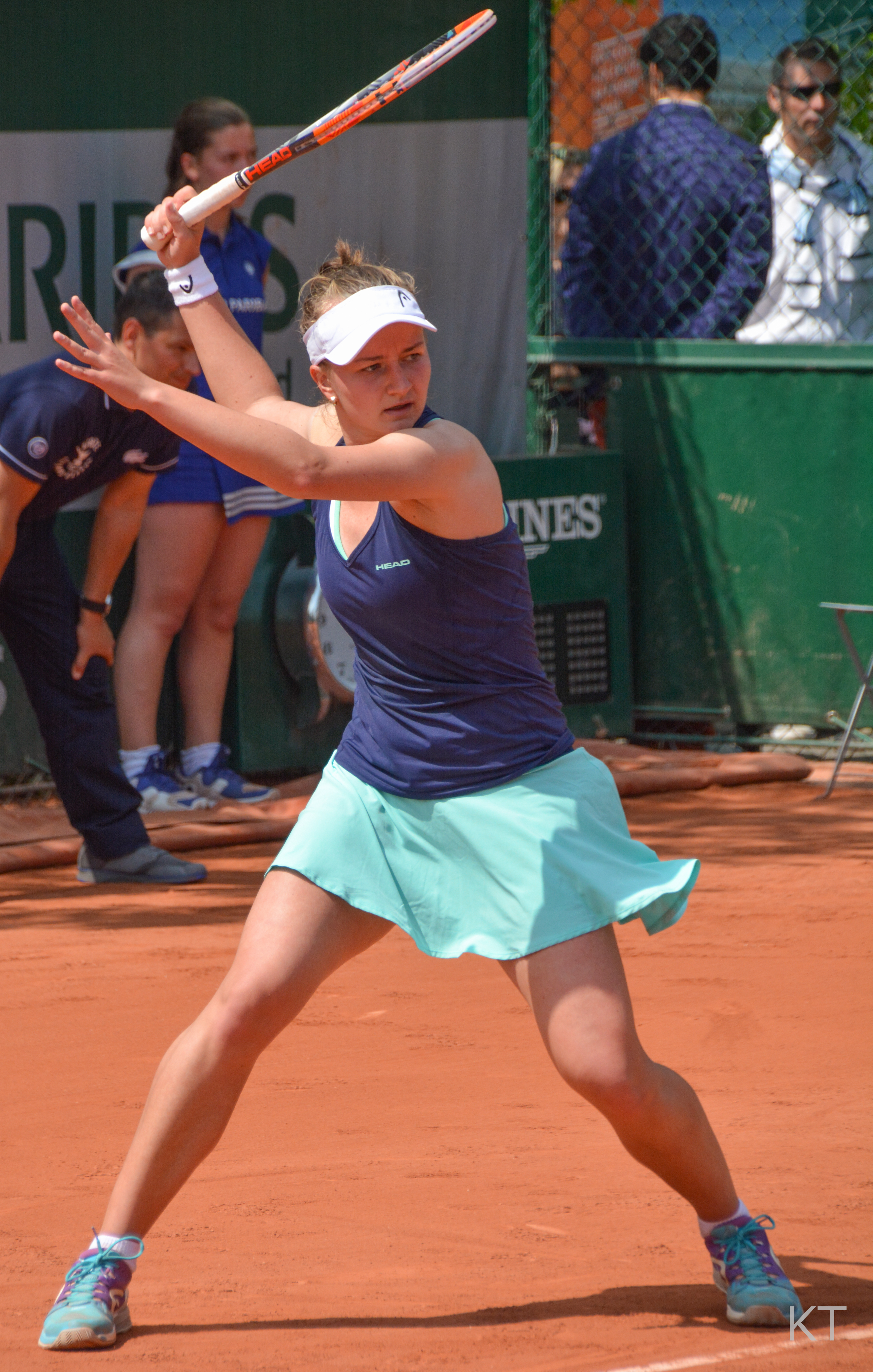 Barbora Krejčíková